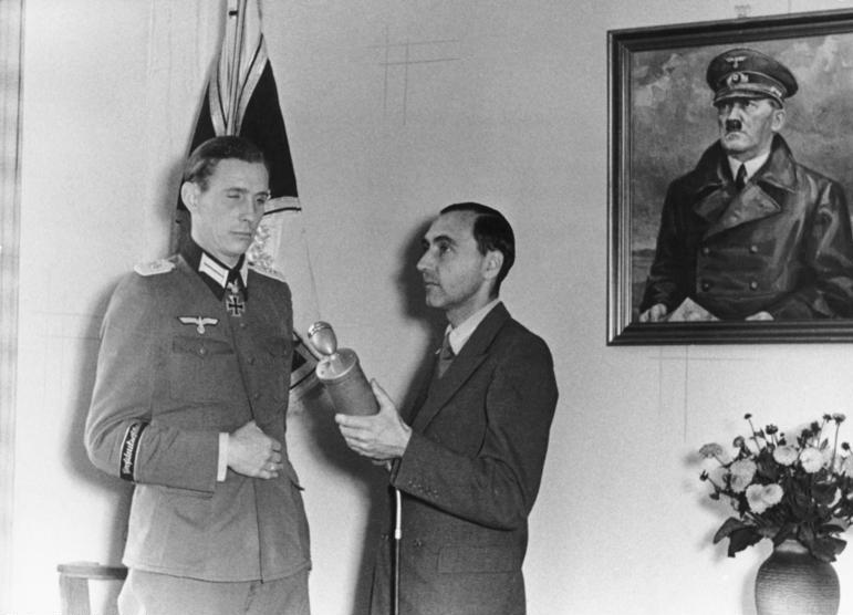 Major Remer, Kommandeur des Wachbataillons Berlin, der den Putschversuch der Offiziere [am 20.7.1944] vereitelte, im Zeitspiegelgespräch mit Paul Gnuva, dem Leiter der Gruppe Zeitgeschehen des Großdeutschen Rundfunks. Abgebildete Personen: Remer, Otto-Ernst: Generalmajor, Ritterkreuz (RK), Heer, Vorsitzender der Sozialistischen Reichspartei (SRP), Bundesrepublik Deutschland (GND 119198908)